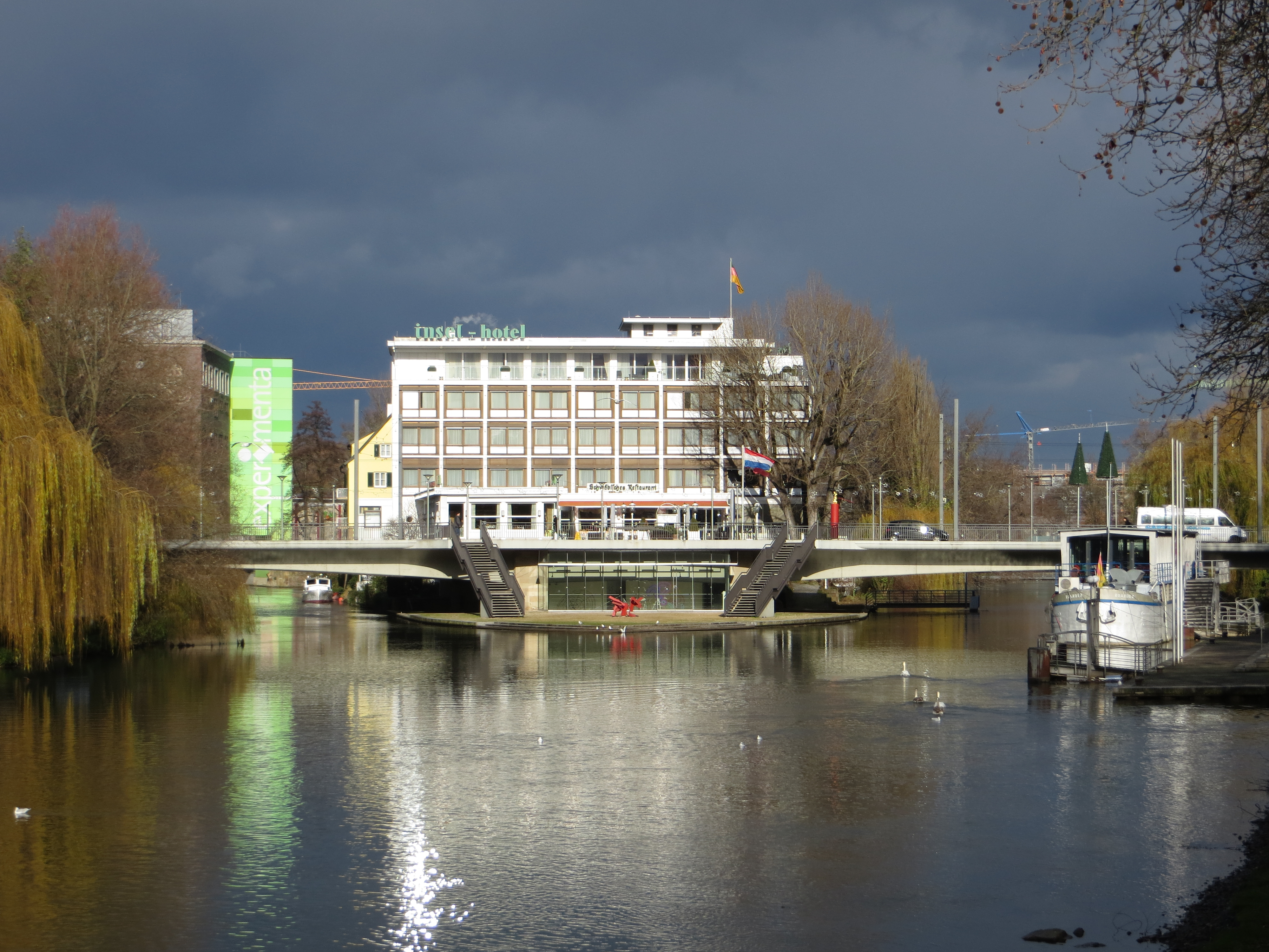 Blick von Süden auf die Friedrich-Ebert-Brücke über den Neckar in Heilbronn. Unter der Brücke die Galerie Rieker, dahinter das Insel-Hotel, links hinten das Science Center Experimenta, rechts auf dem Neckar das Theaterschiff.